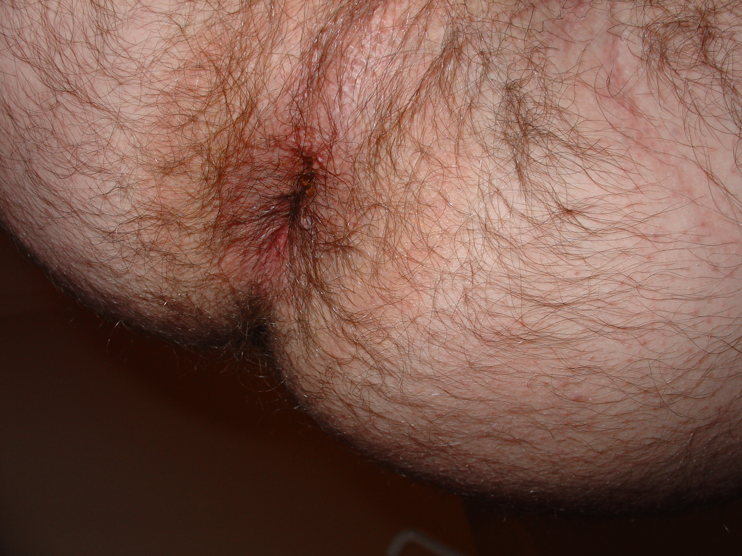 Anus, von Herr Cruijff, Johan. Immer so braun wie Davids.